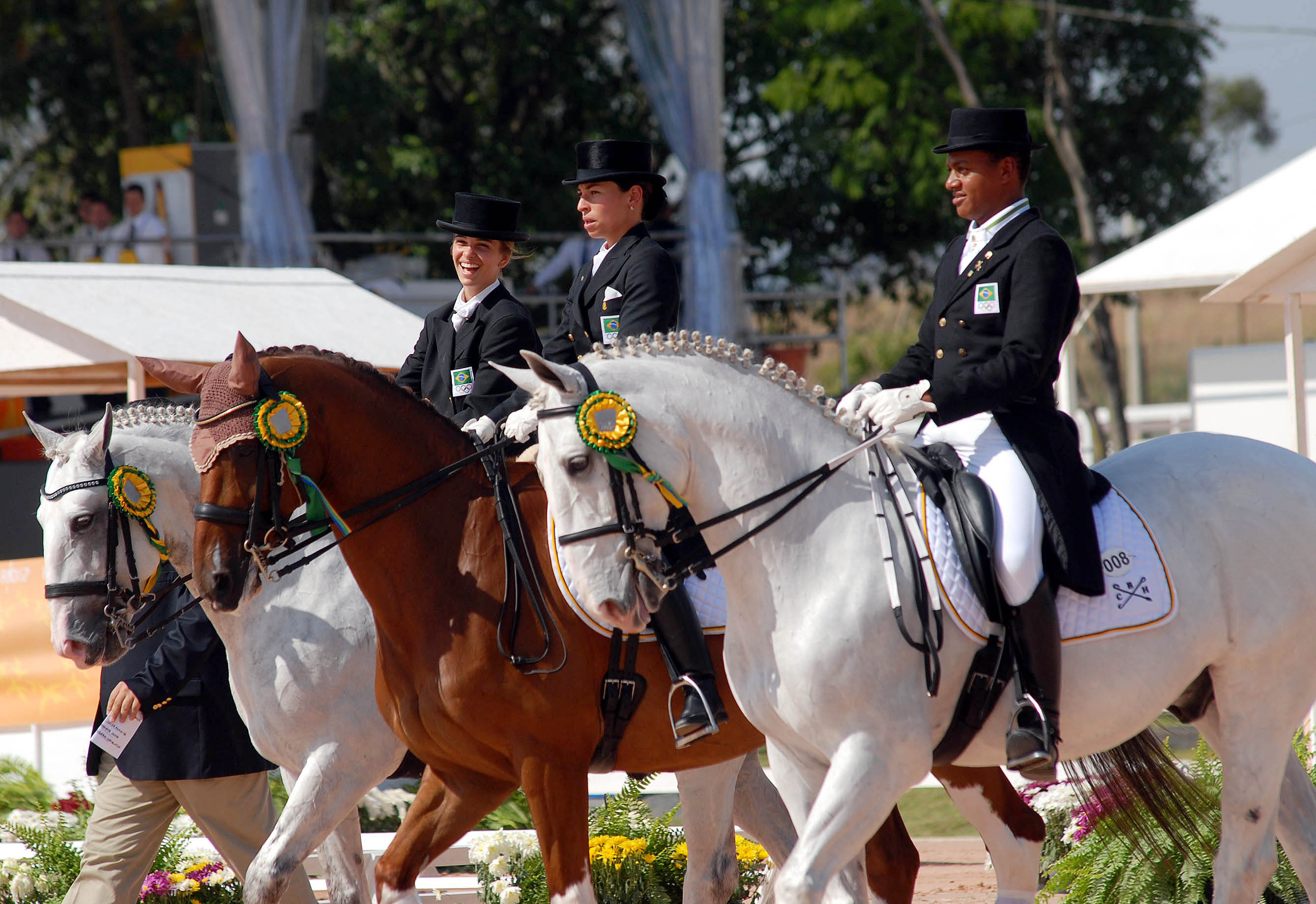 Rio de Janeiro - Equipe da modalidade adestramento, que ganhou a medalha de bronze nos Jogos Pan-Americanos.